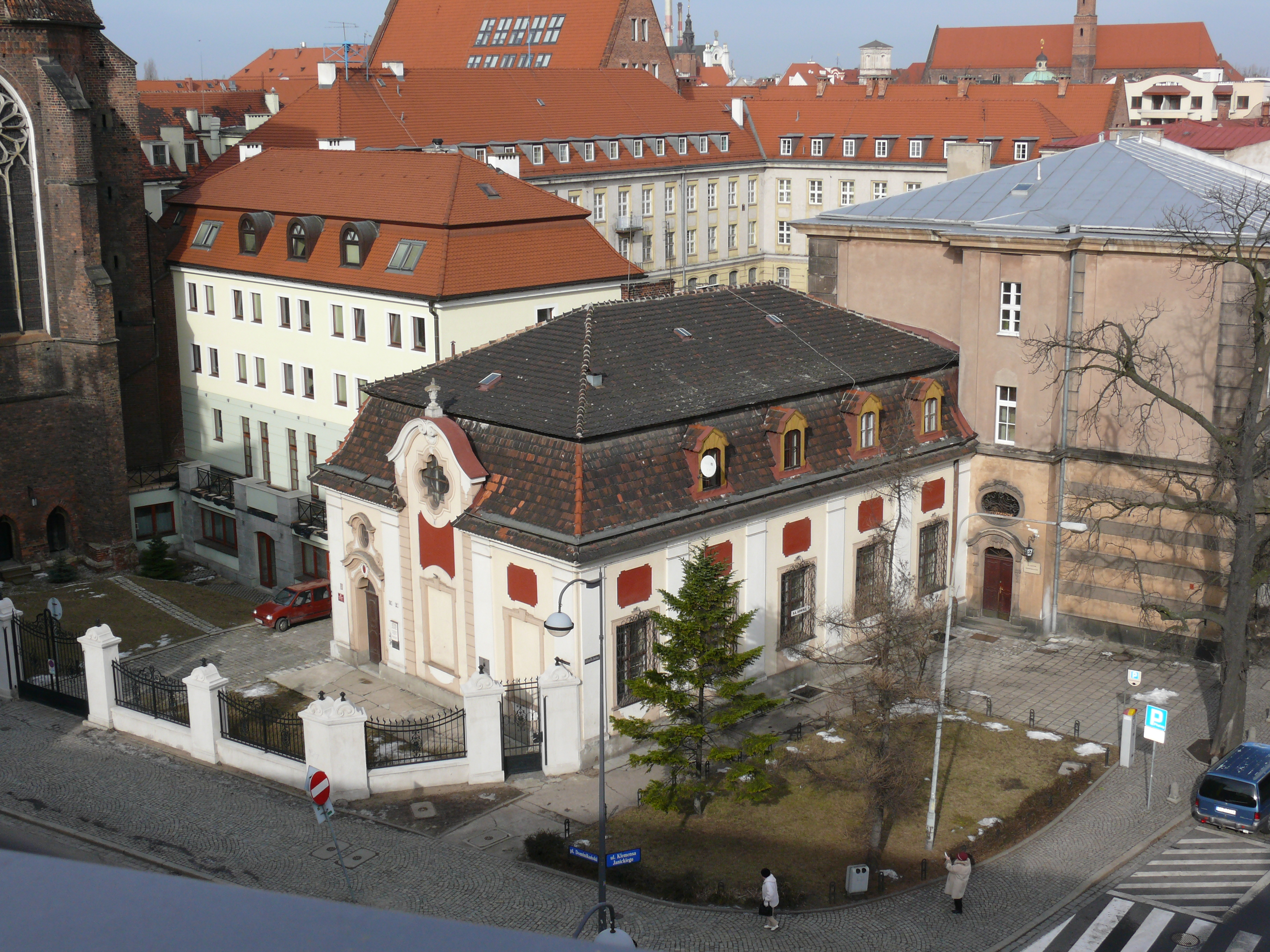 Reflektarz dominikanów przy kościele św. Wojciecha